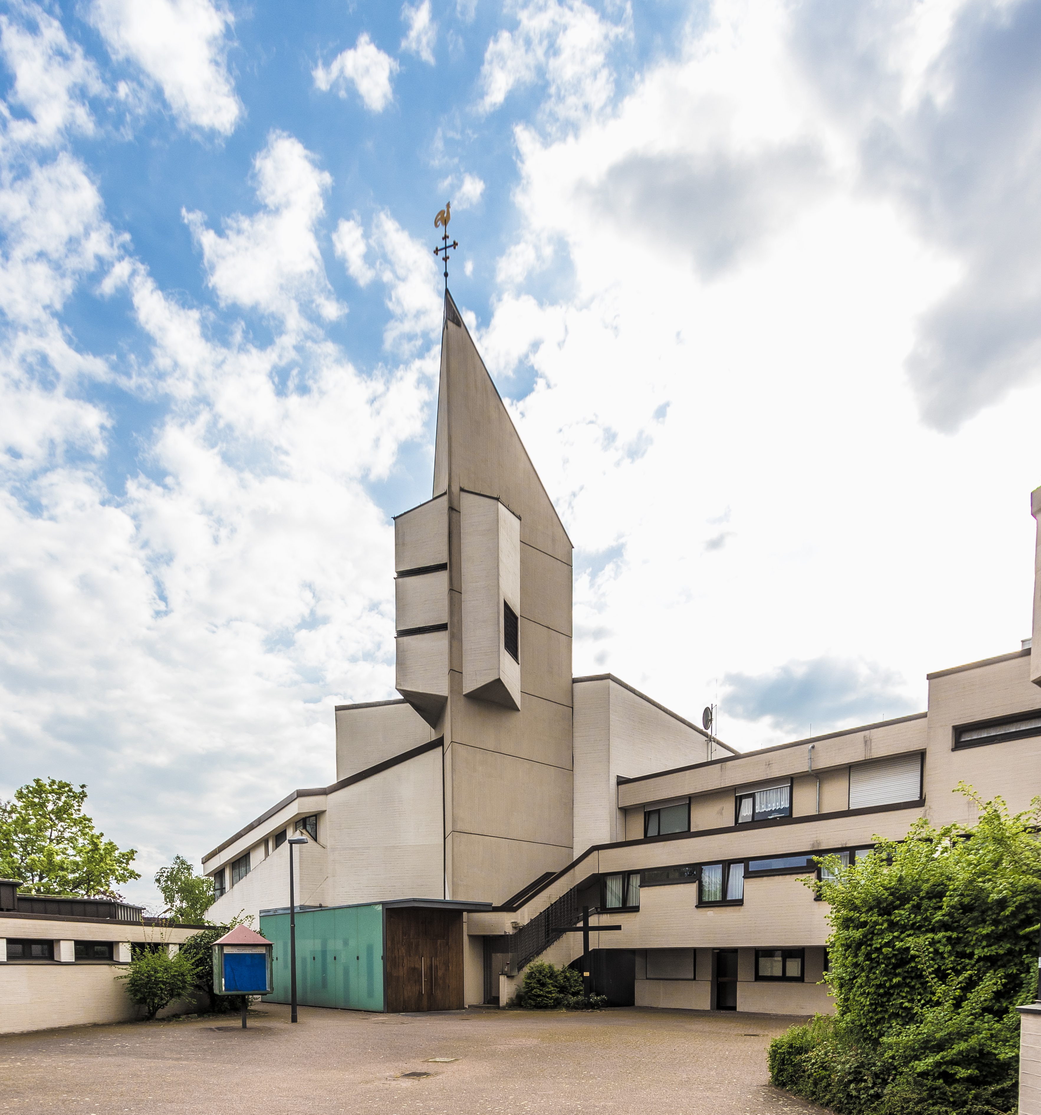 Kirche Christi Geburt, Köln-Bocklemünd/Mengenich. Architekt Eduard Frieling, Karl Dunkelberg.